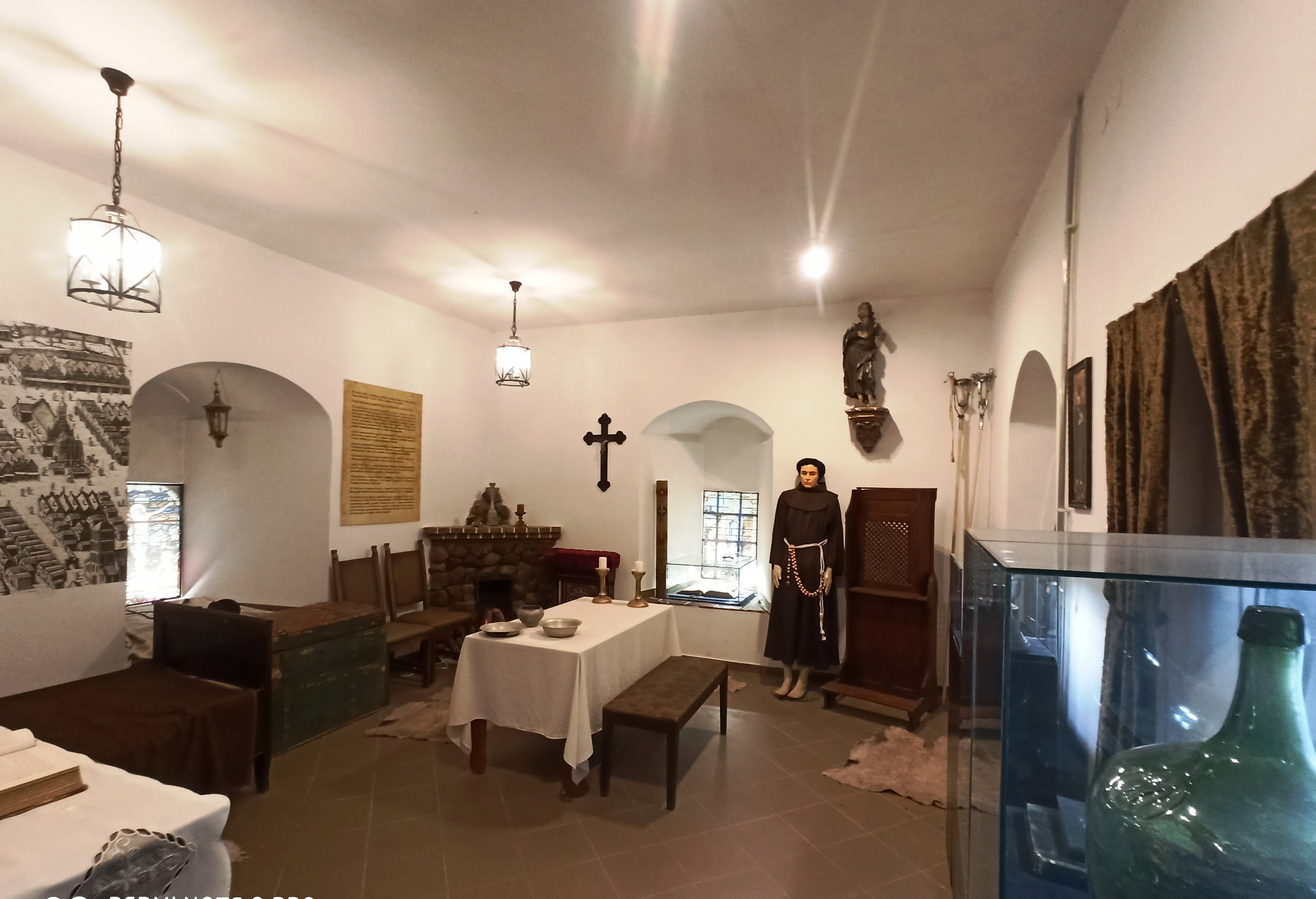 Braniewo Muzeum Ziemi Braniewskiej Wieża klesza cela franciszkańska